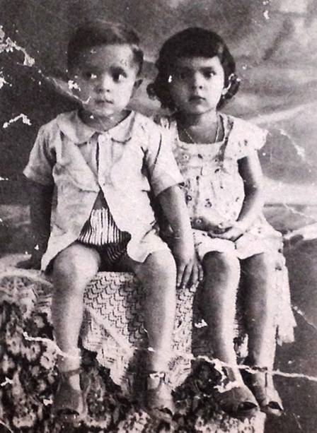 Lula ao lado de uma de suas irmãs.